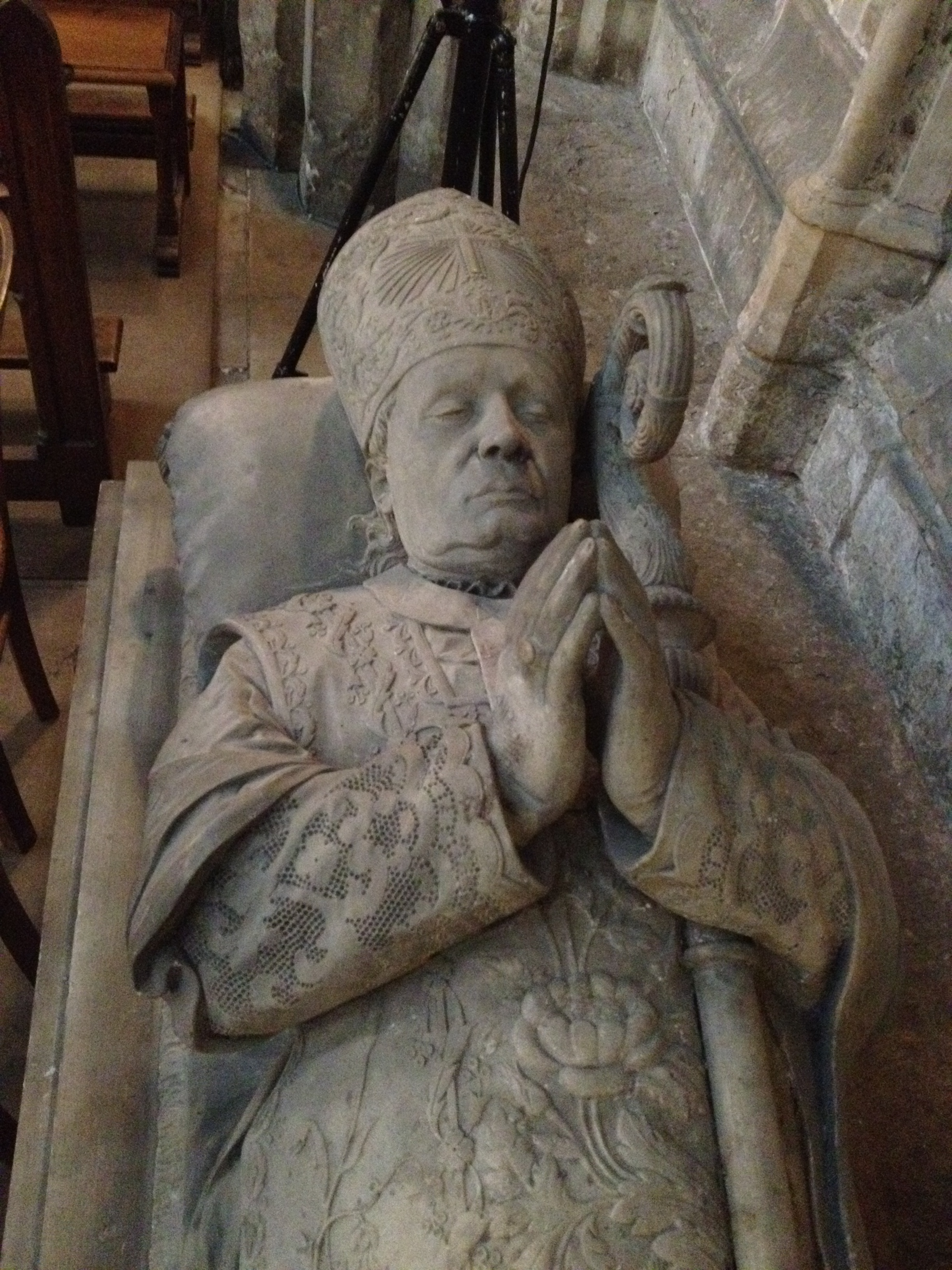 Louis Guillaume Fulconis, Gisant du cardinal de Croy, archevêque de Rouen (1824-1844), 1856, détail, cathédrale Notre-Dame de Rouen.